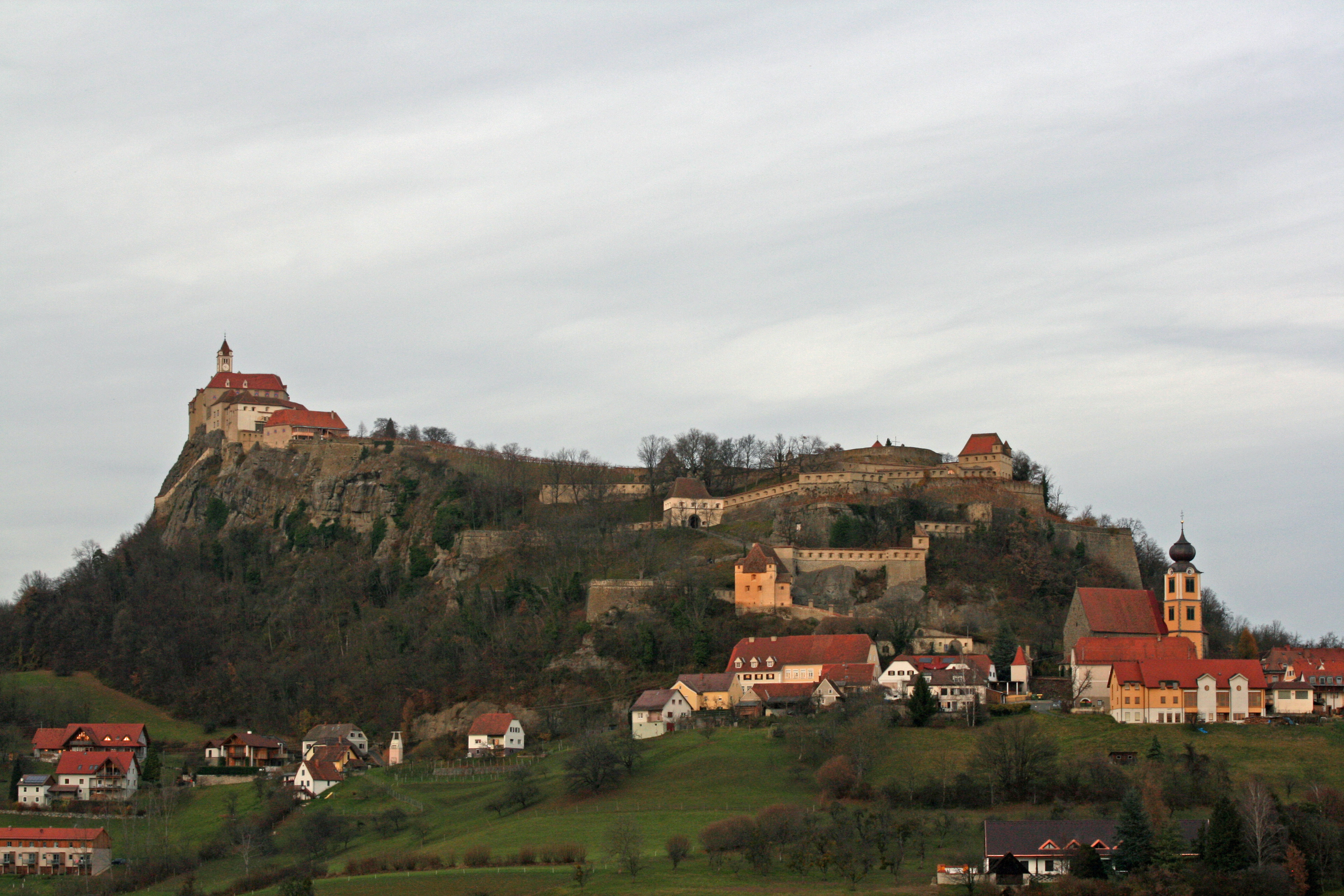 Riegersburg, Steiermark, Austria